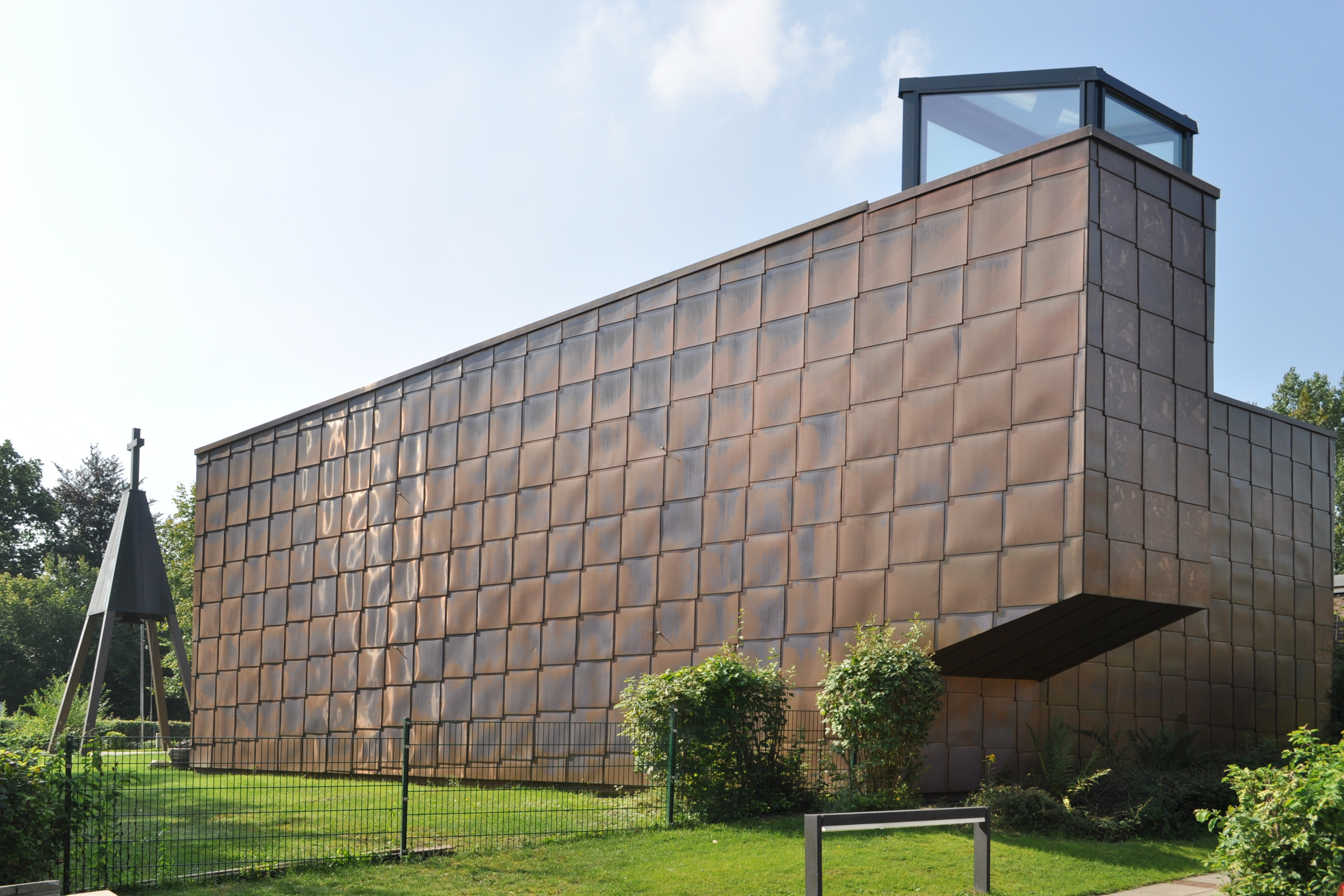 Seitenansicht der Philemon-Kirche in Hamburg-Hummelsbüttel.